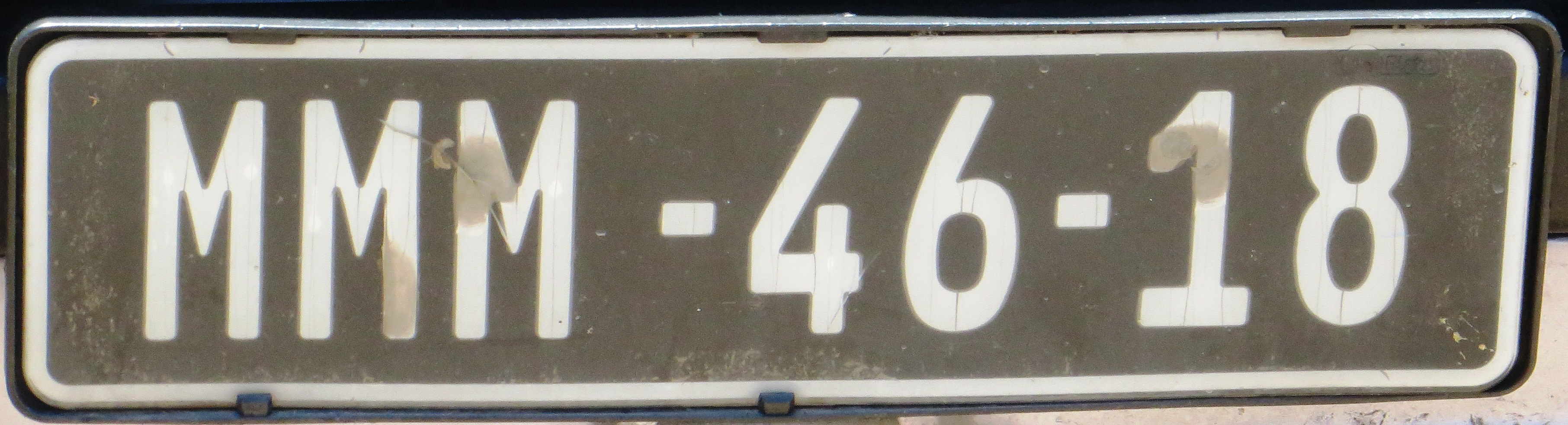 Mozambique kentekenplaat